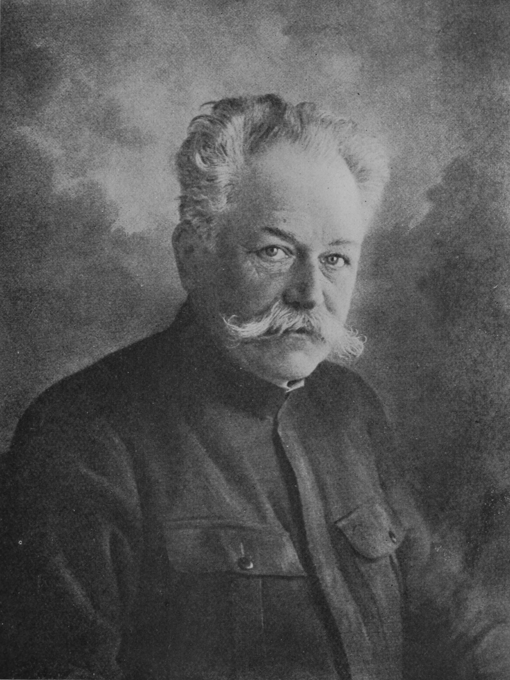 EL general francés Maurice Sarrail, comandante en jefe de las tropas de la Entente en el frente de Macedonia durante la Primera Guerra Mundial.